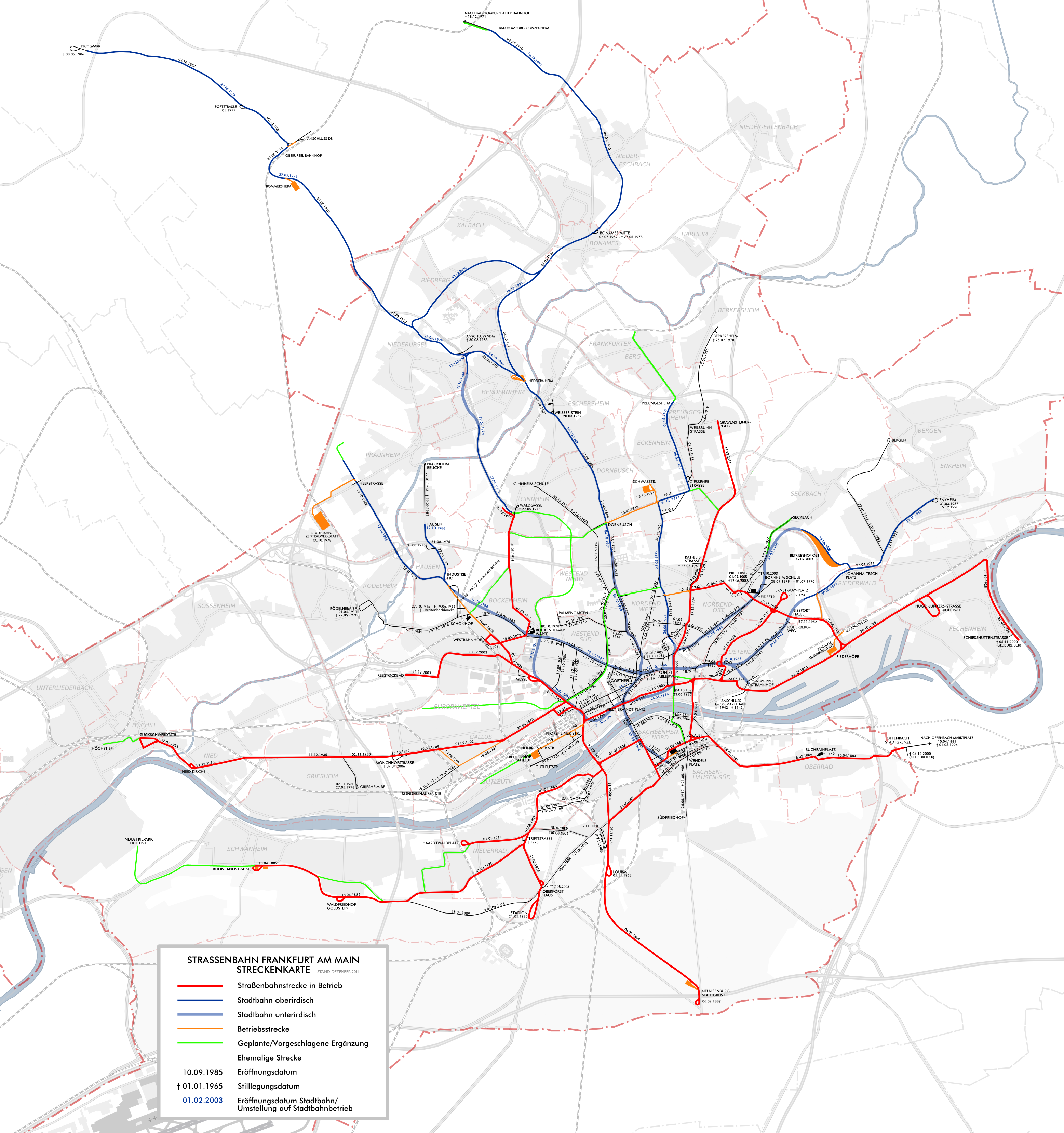 Straßenbahn Frankfurt am Main, aktuelle, ehemalige und geplante Strecken sowie U-Bahn.